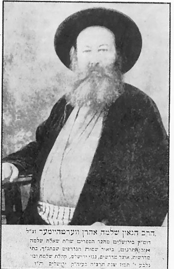 jpg